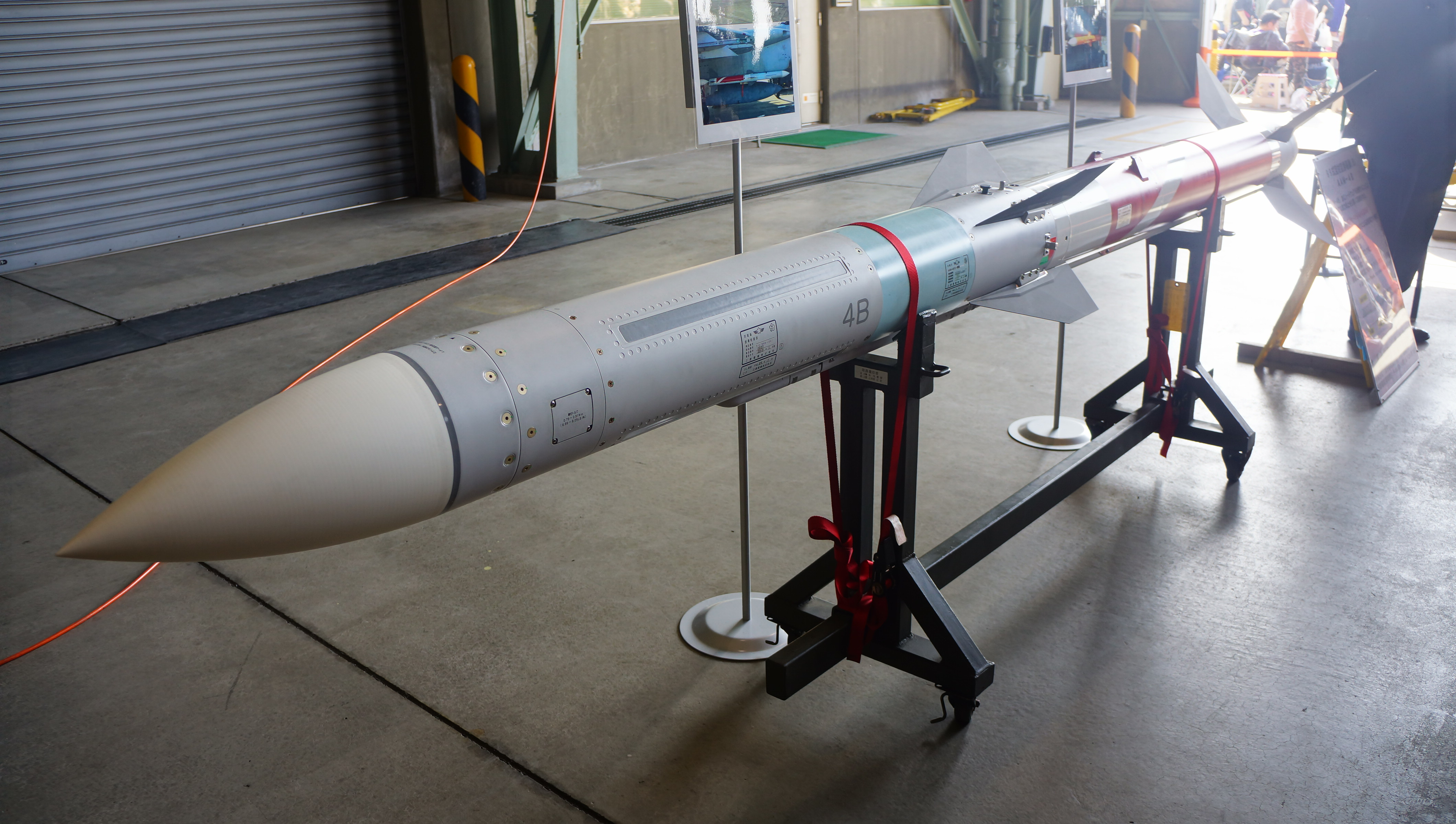 航空自衛隊 99式空対空誘導弾（B）（AAM-4B） 試験弾。 13年11月24日 航空自衛隊岐阜基地にて。